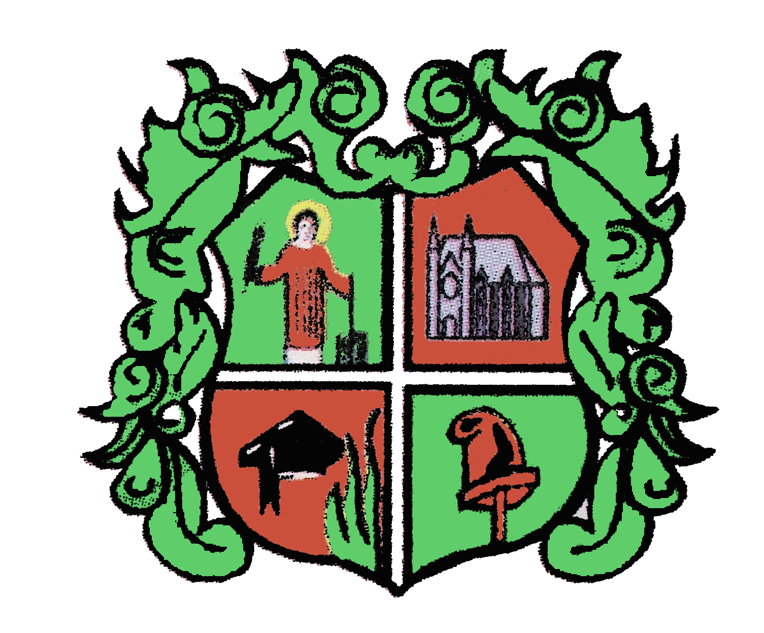 Escudo de San Lorenzo